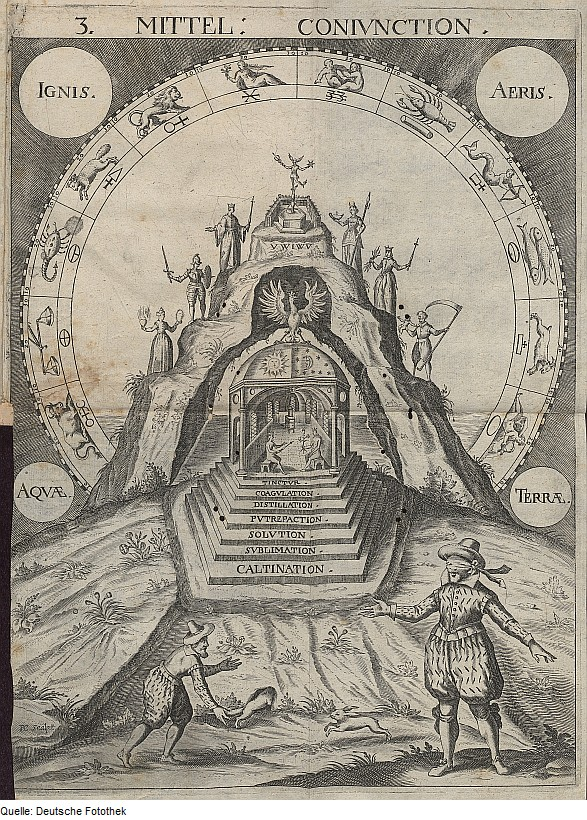 Original image description from the Deutsche FotothekTheosophie & Alchemie & Judentum & Kabbala